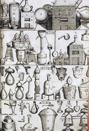 Utensilios ocupados por Lemery en su laboratorio